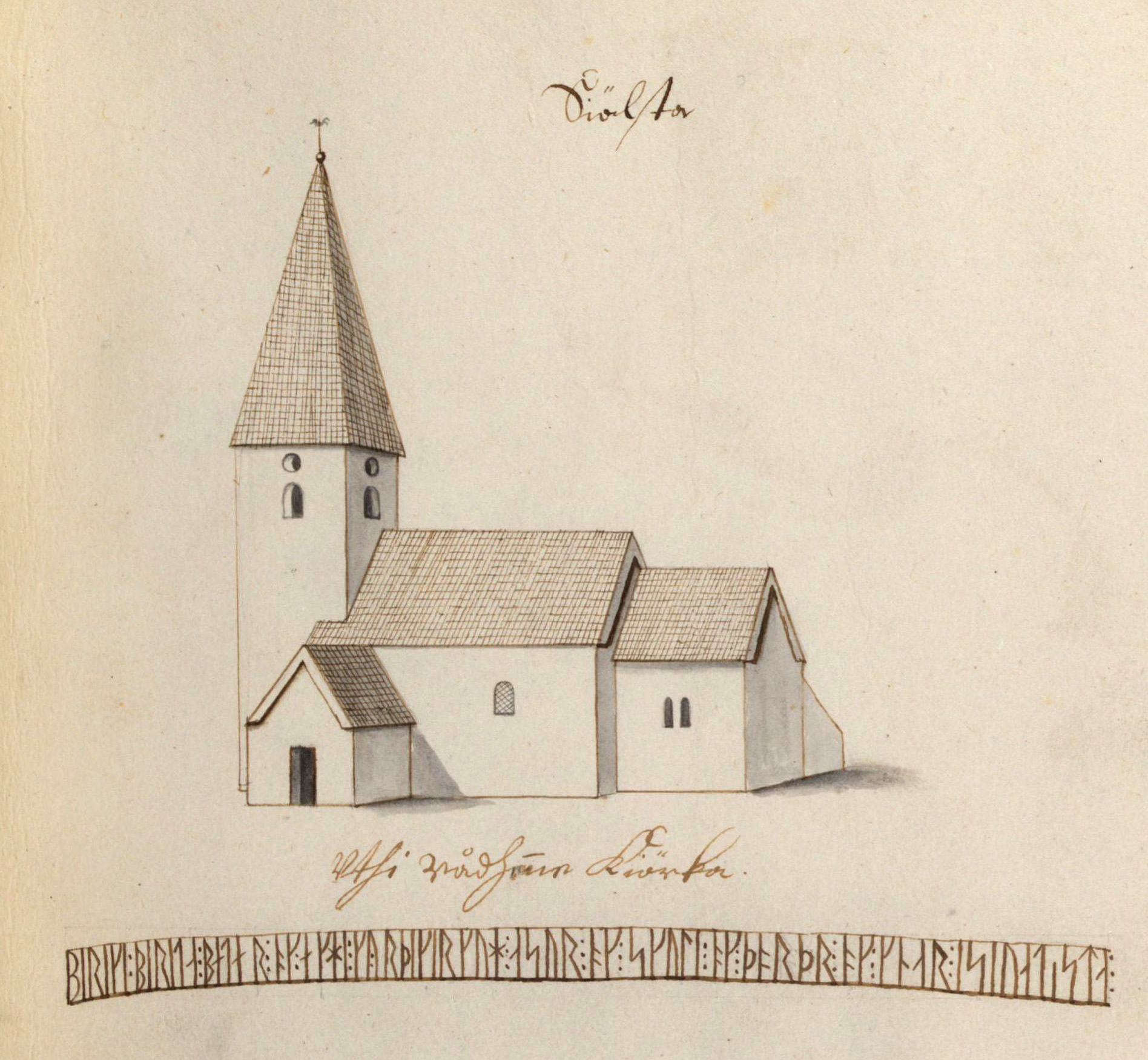 Sjogerstads kyrka. Kyrka, äldre, teckning ur Peringskiölds Monumenta, avfotograferad i färg.